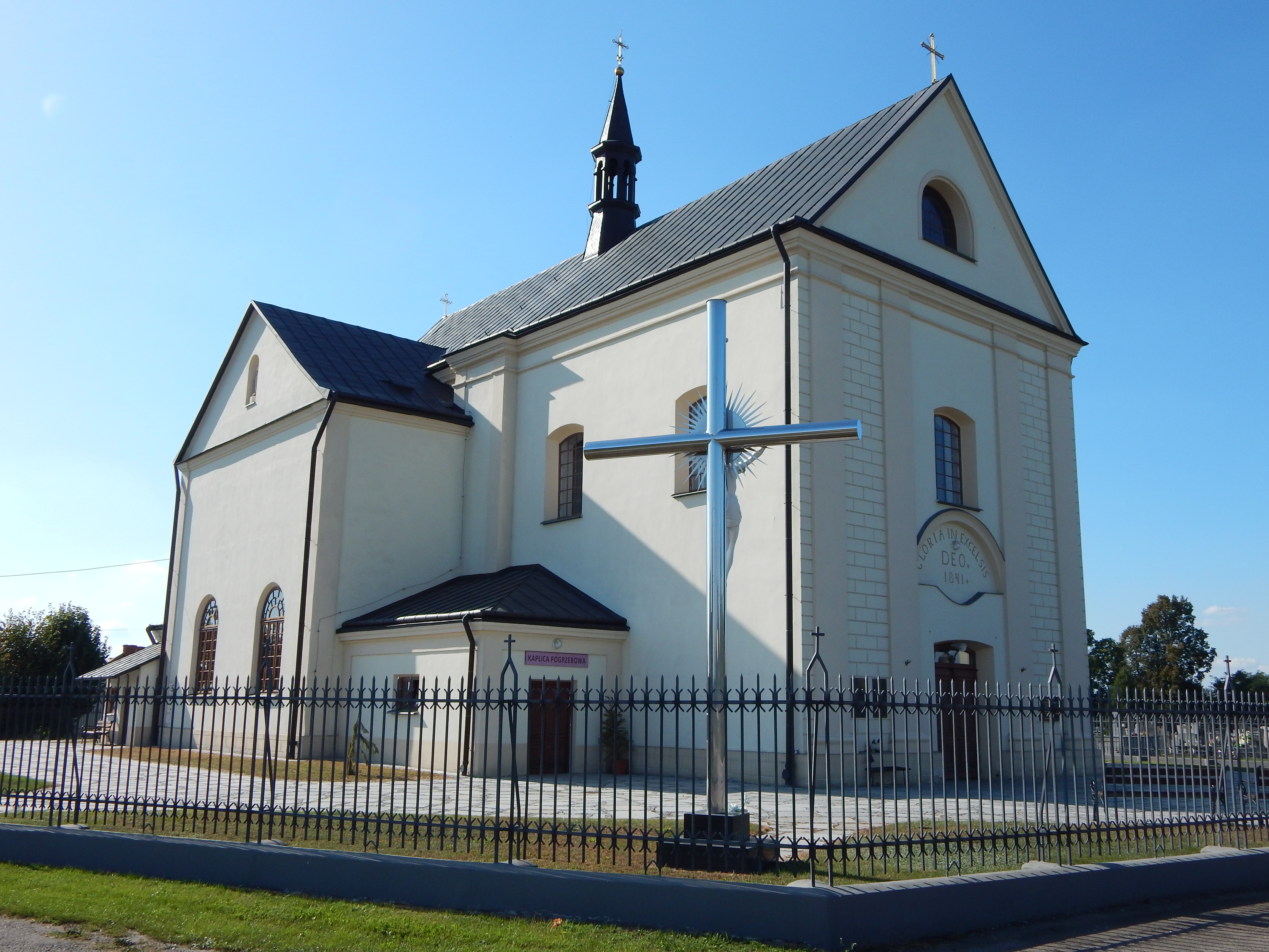 Kuryłówka, Kościół św. Józefa w Tarnawcu